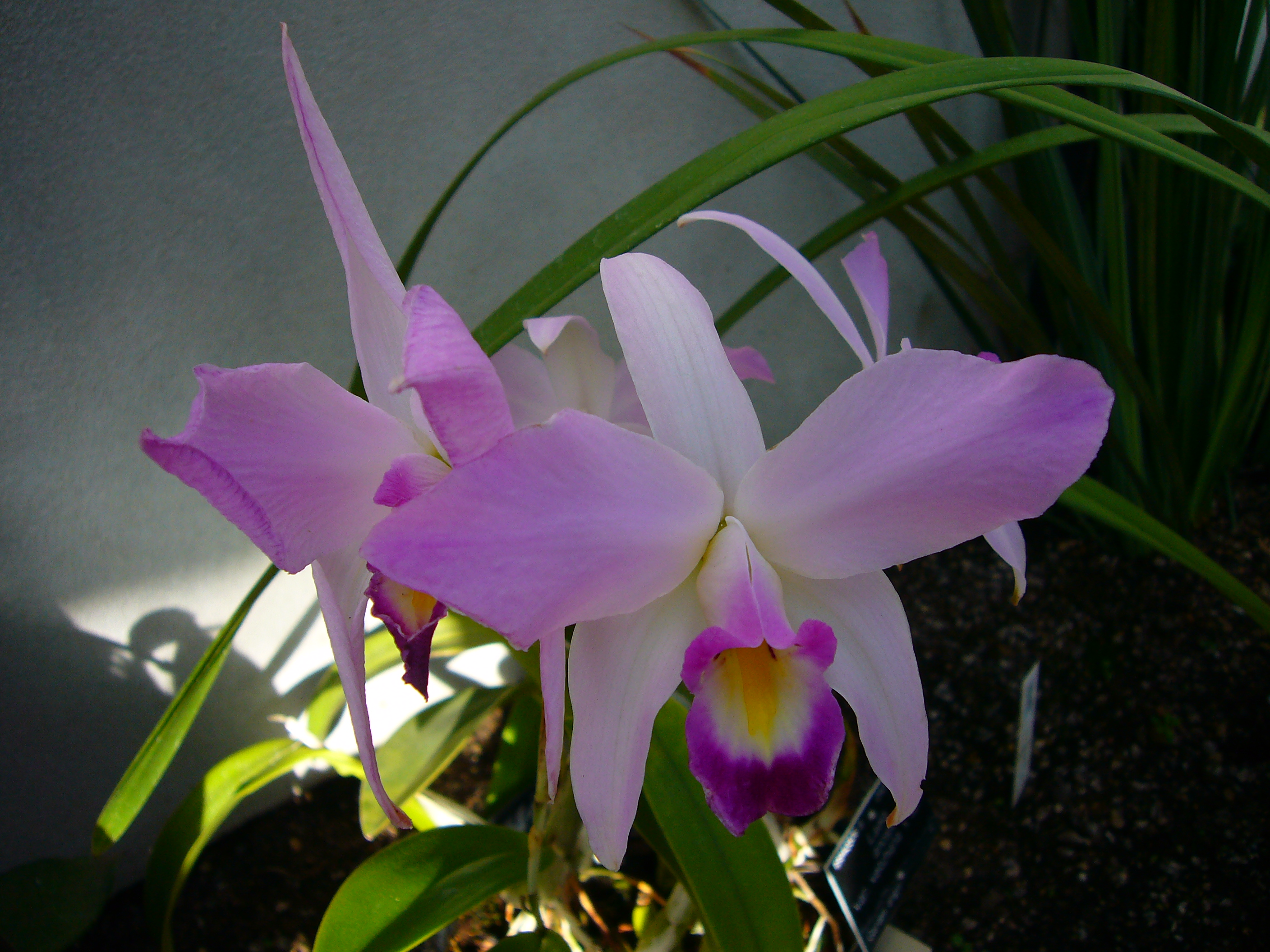 Laelia anceps var. veitchiana Rchb.f.